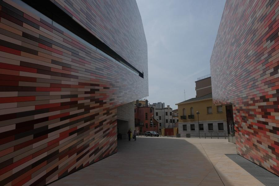 Museo M9 - Mestre